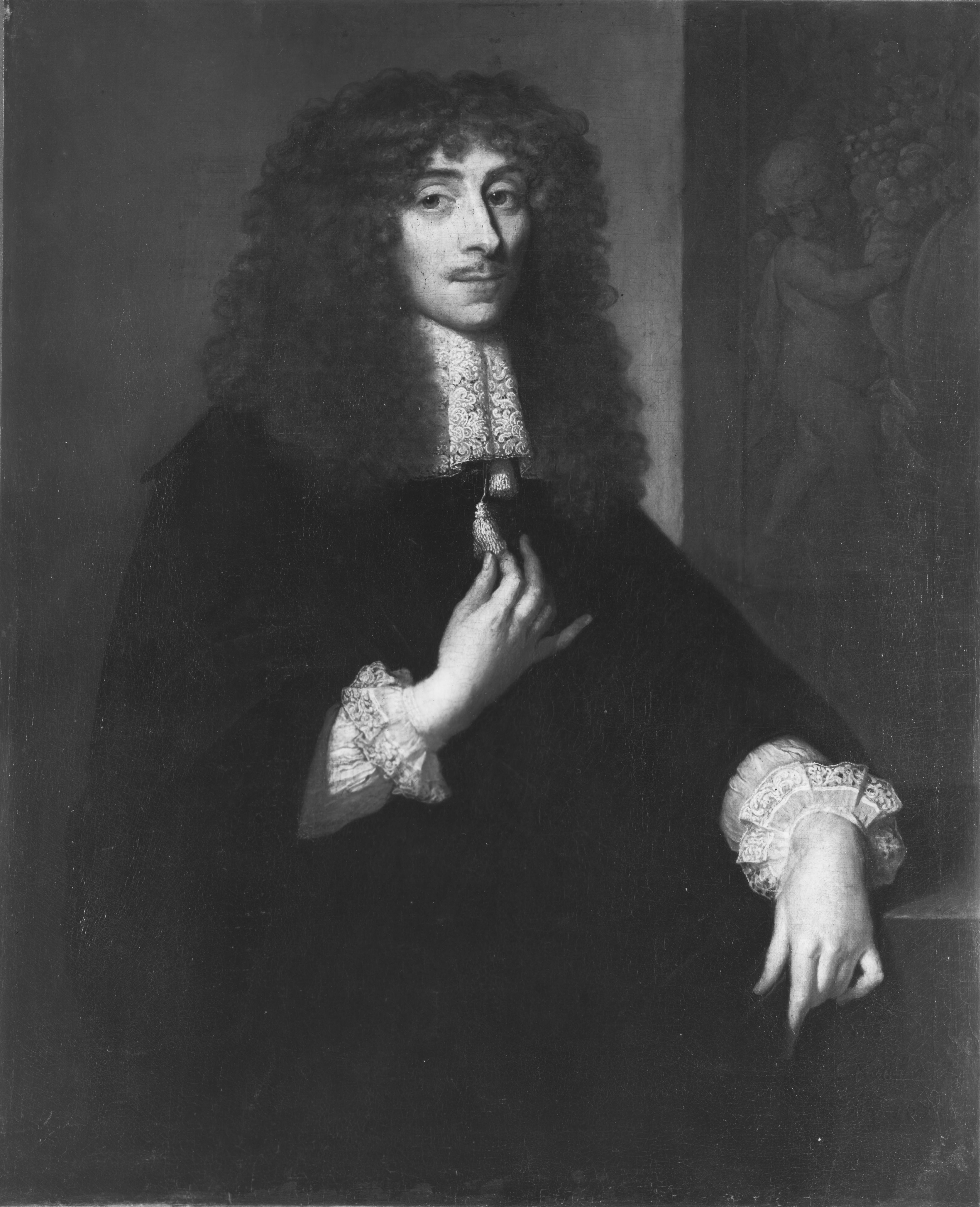 Gerard Bicker (I) van Swieten (1632–1716), vrijheer von Oud-Haarlem und Kortenbosch, Herr von Swieten, Rekenmeester von Holland